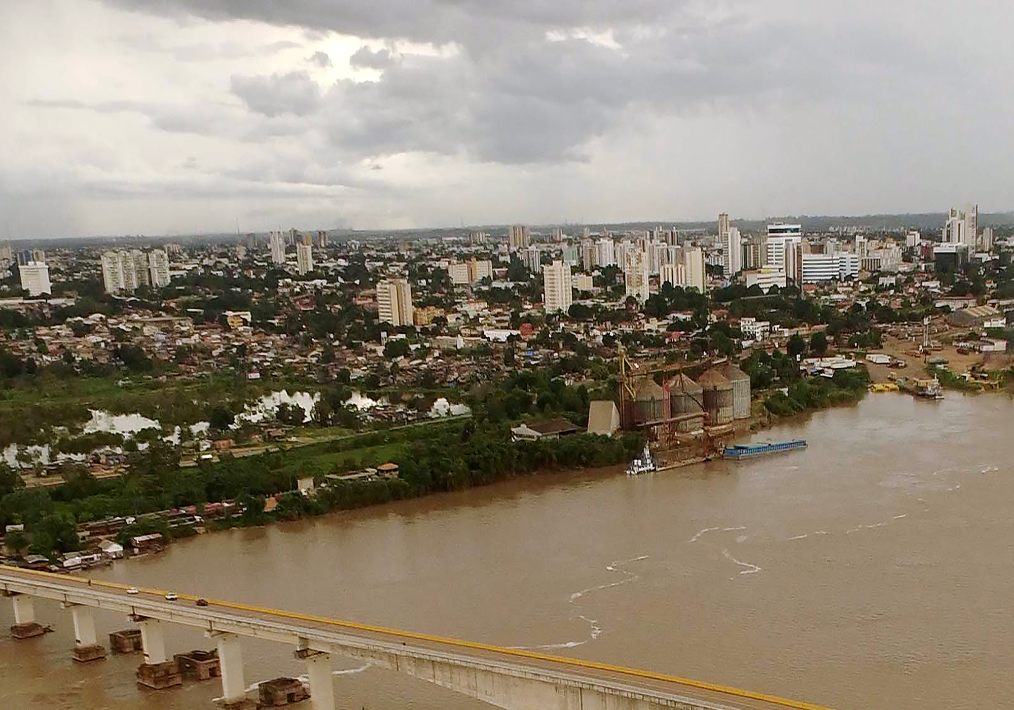 Vista da cidade de Porto Velho, capital do Estado de Rondônia, região Norte do Brasil.